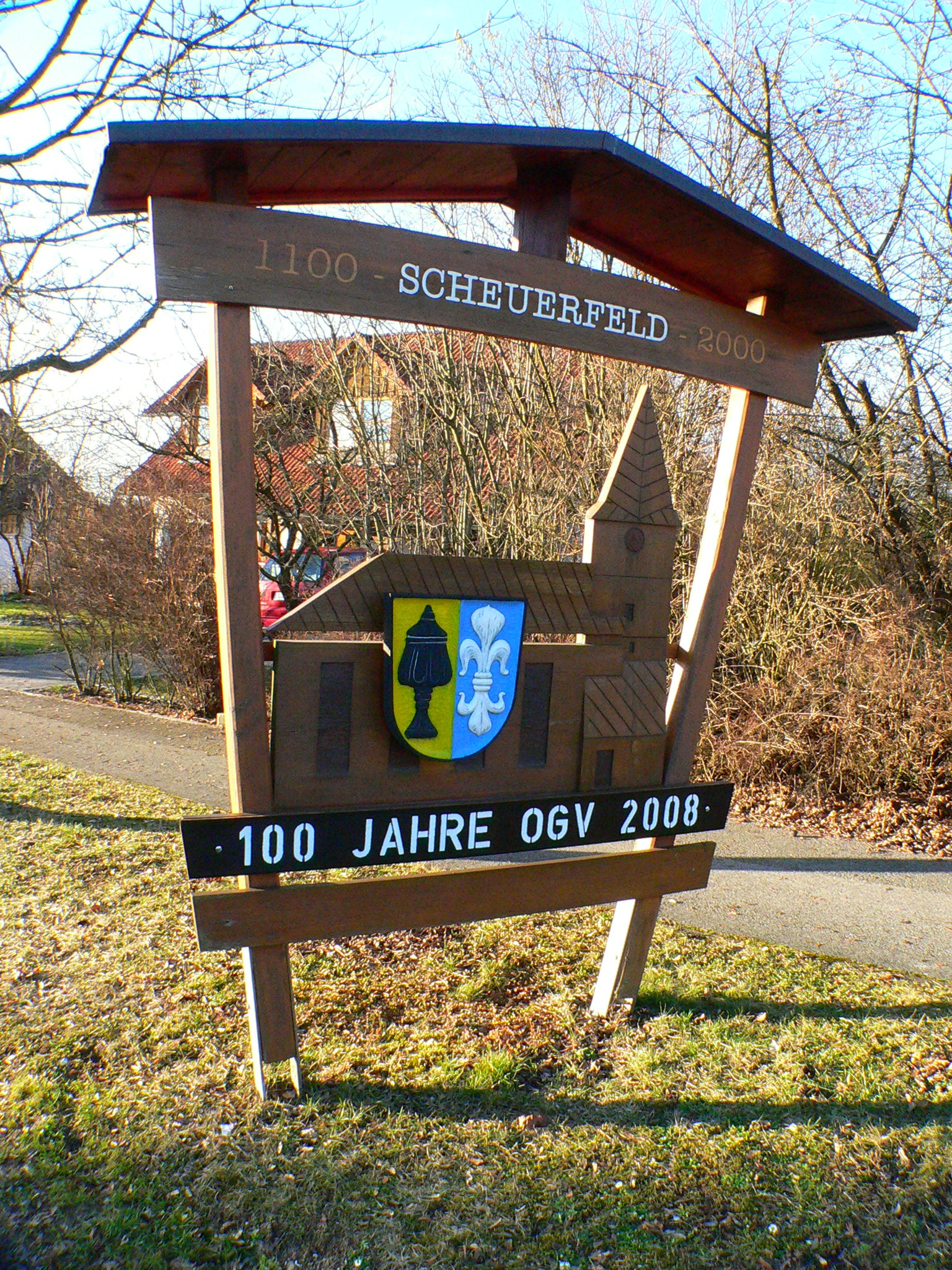 Coburg Stadtteil Scheuerfeld, Ortsschild